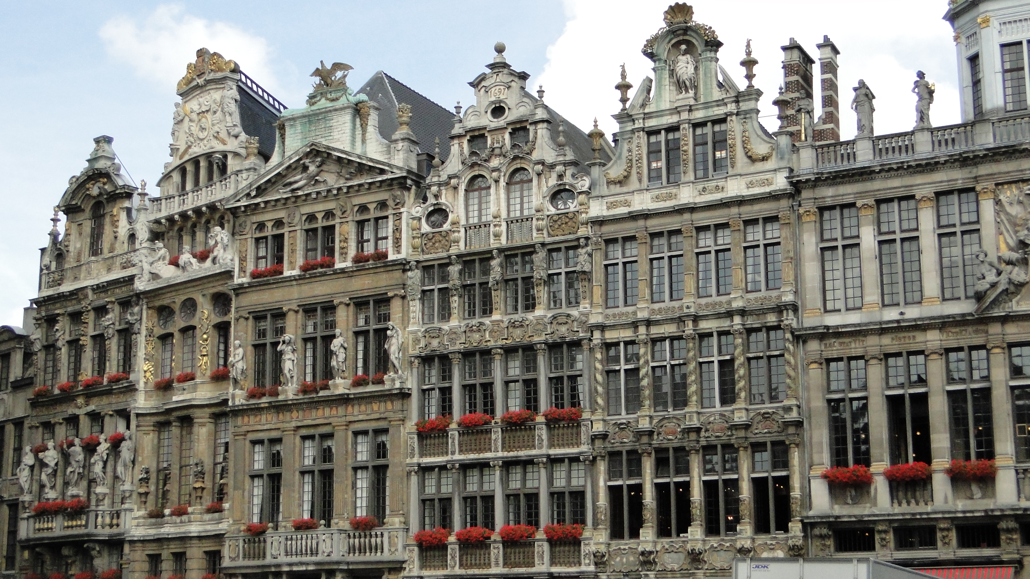 Bruselas, Grand Place